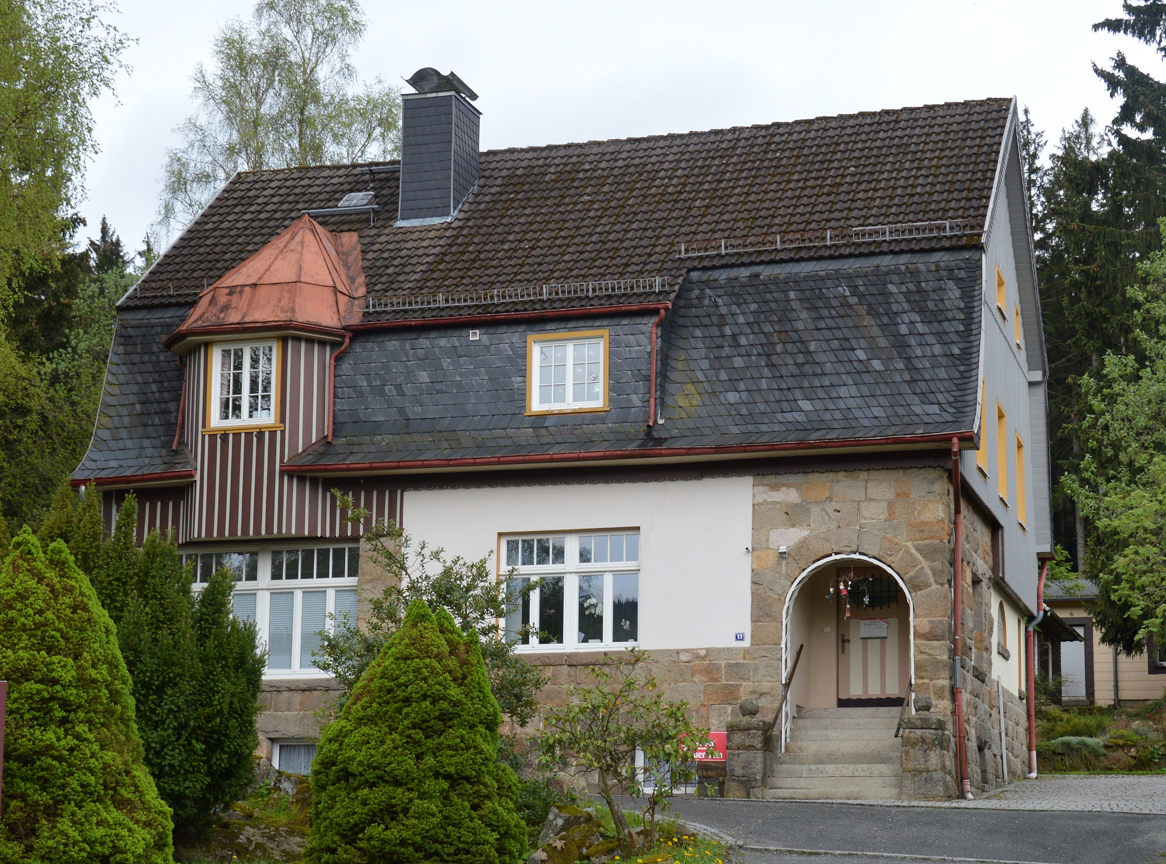 Barenberg 13 in Schierke